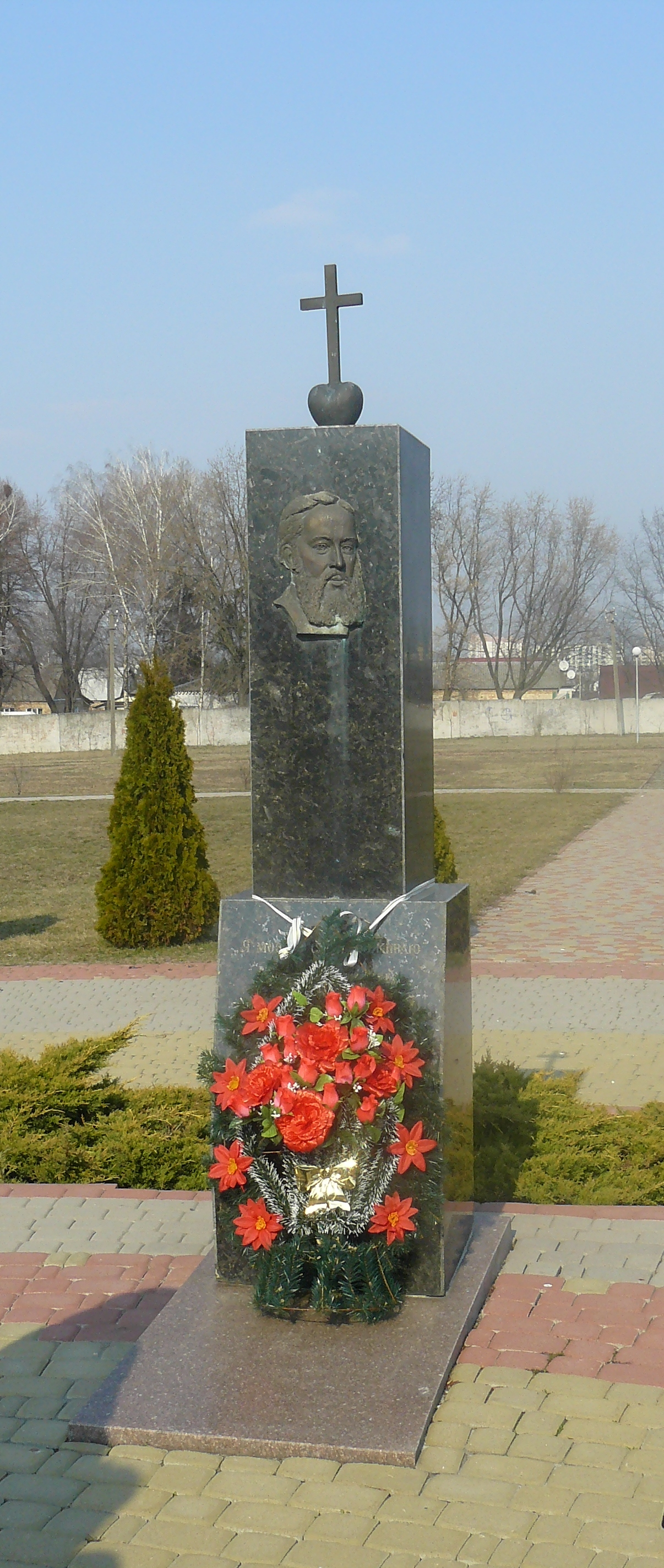 Символічна могила П. Чубинського в Борисполі